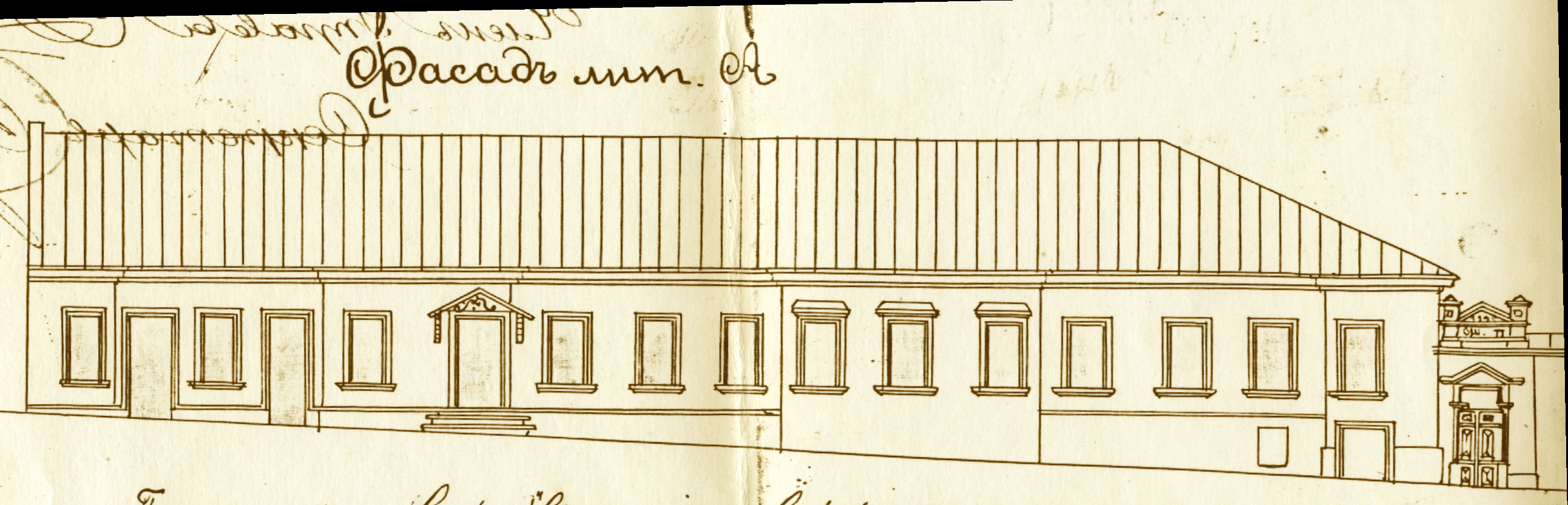 Беларуская (тарашкевіца): Менск (Miensk), вуліца Койданаўская (vulica Kojdanaŭskaja). Бурса езуіцкага калегіюму